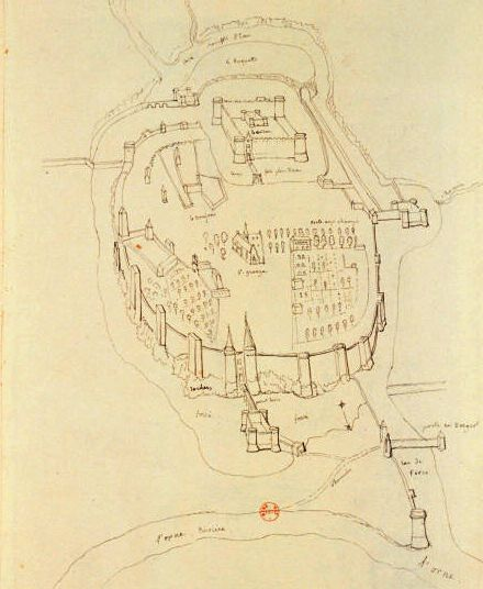 Auteur Non identifié Titre Plan du chateau de Guillaume le Conquérant à Caen en grand format Publication [19e siècle] Description Dessin à la plume et encre de Chine ; 34 x 21,9 cm Droits libre de droit Notes Texte manuscrit en bas du document Cote : BNF Richelieu Estampes et photographie Rés. Ve-26h-Fol. Destailleur Province, t. 3, n. 832 . microfilm A030980 Genre audiovisuel Vues à vol d'oiseau -- 19e siècle Identifiant 07740835 Autre(s) auteur(s) Destailleur, Hippolyte (1822-1893) Sujet(s) Fortifications modifié par Rinaldum 10 jan 2004 à 23:10 (CET) Trouvé sur le site Gallica de la BNF